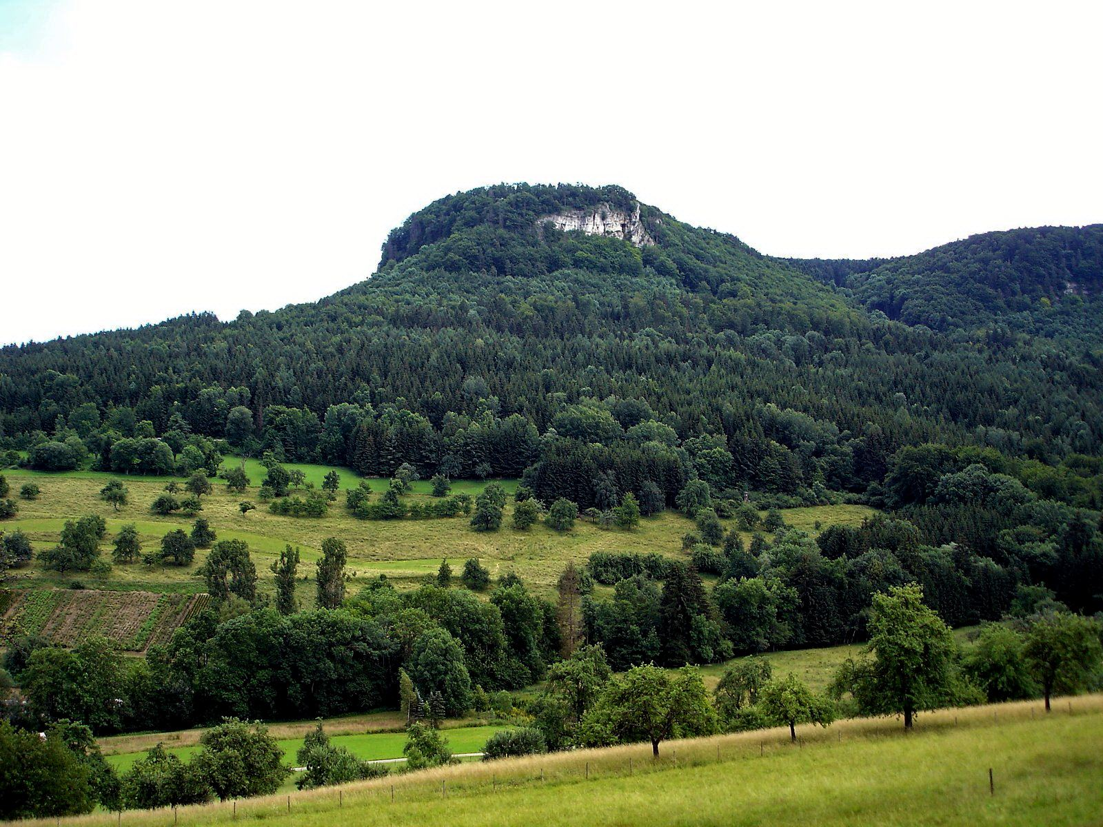 Gräbelesberg